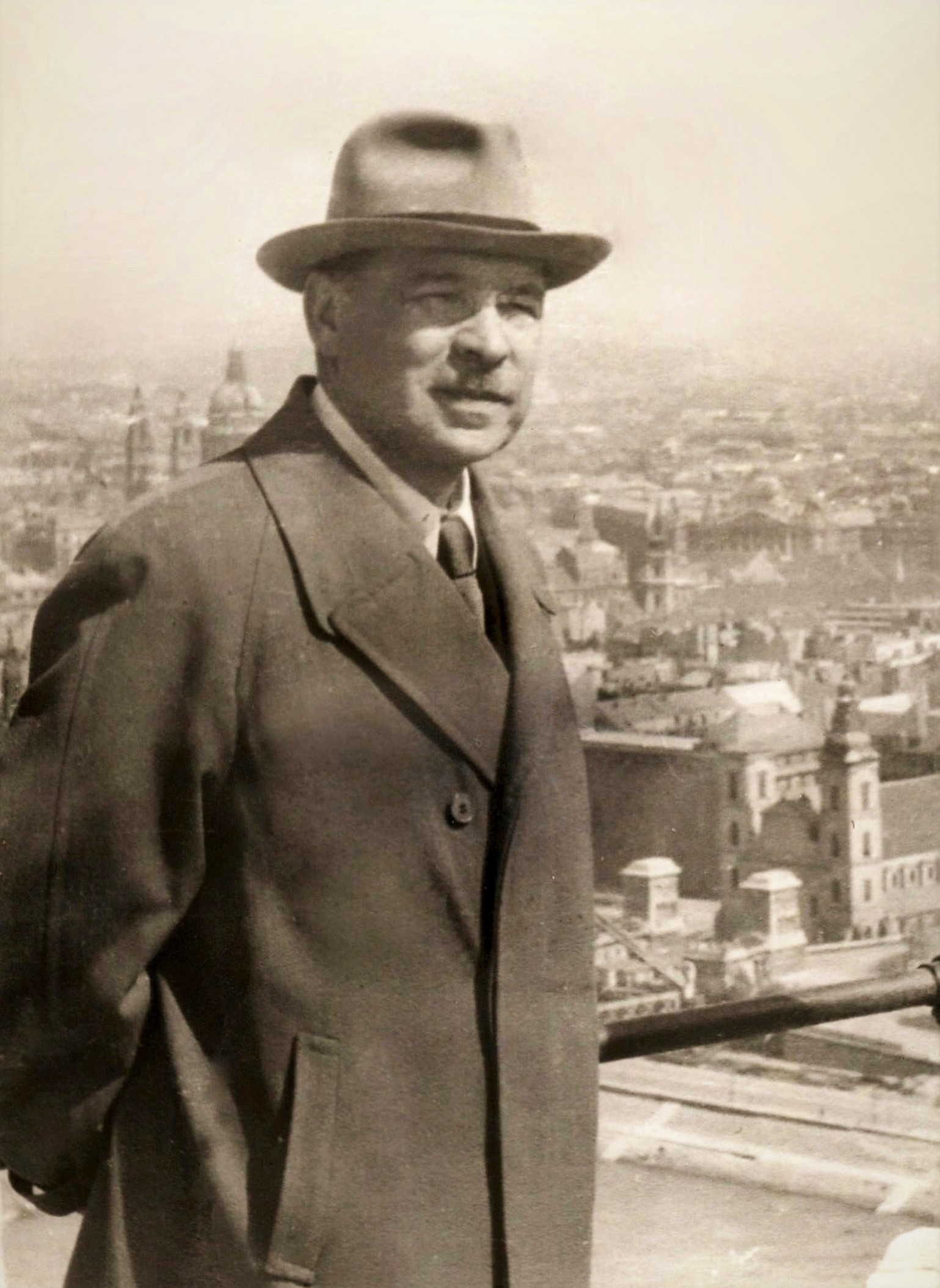 Будапешт, осень 1945 года. Река Дунай, разрушенный бомбардировками мост, еще не восстановлен. Л.А. Говоров отправился в Европу в отпуск с женой. Сталин тогда настоял, чтобы полководец поехал в двухнедельный отпуск поправить здоровье. Предложил ему выбрать две любые страны в зоне советского влияния. Говоров выбрал Венгрию и Чехословакию